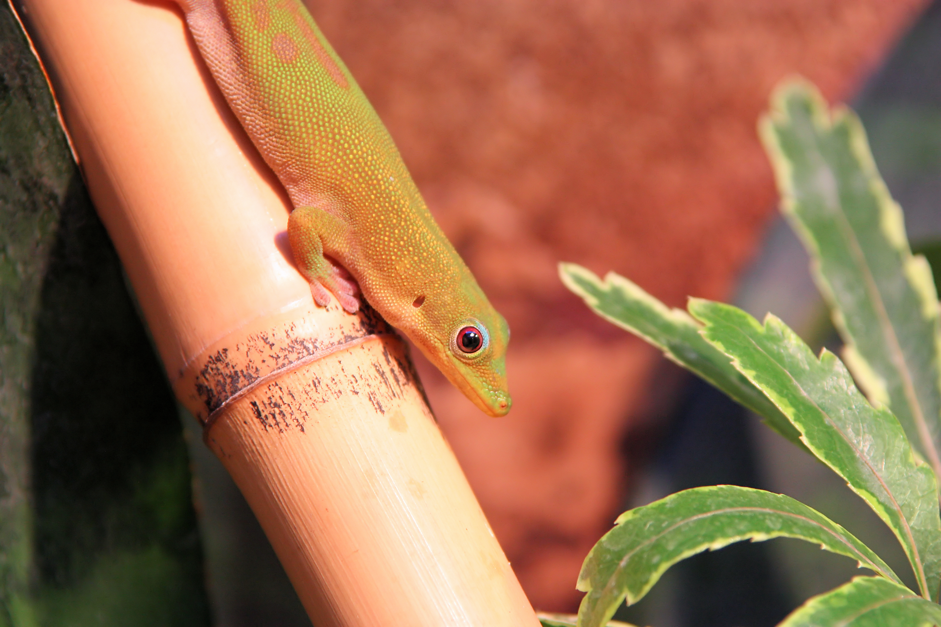 Palme Taggecko, Phelsuma dubia